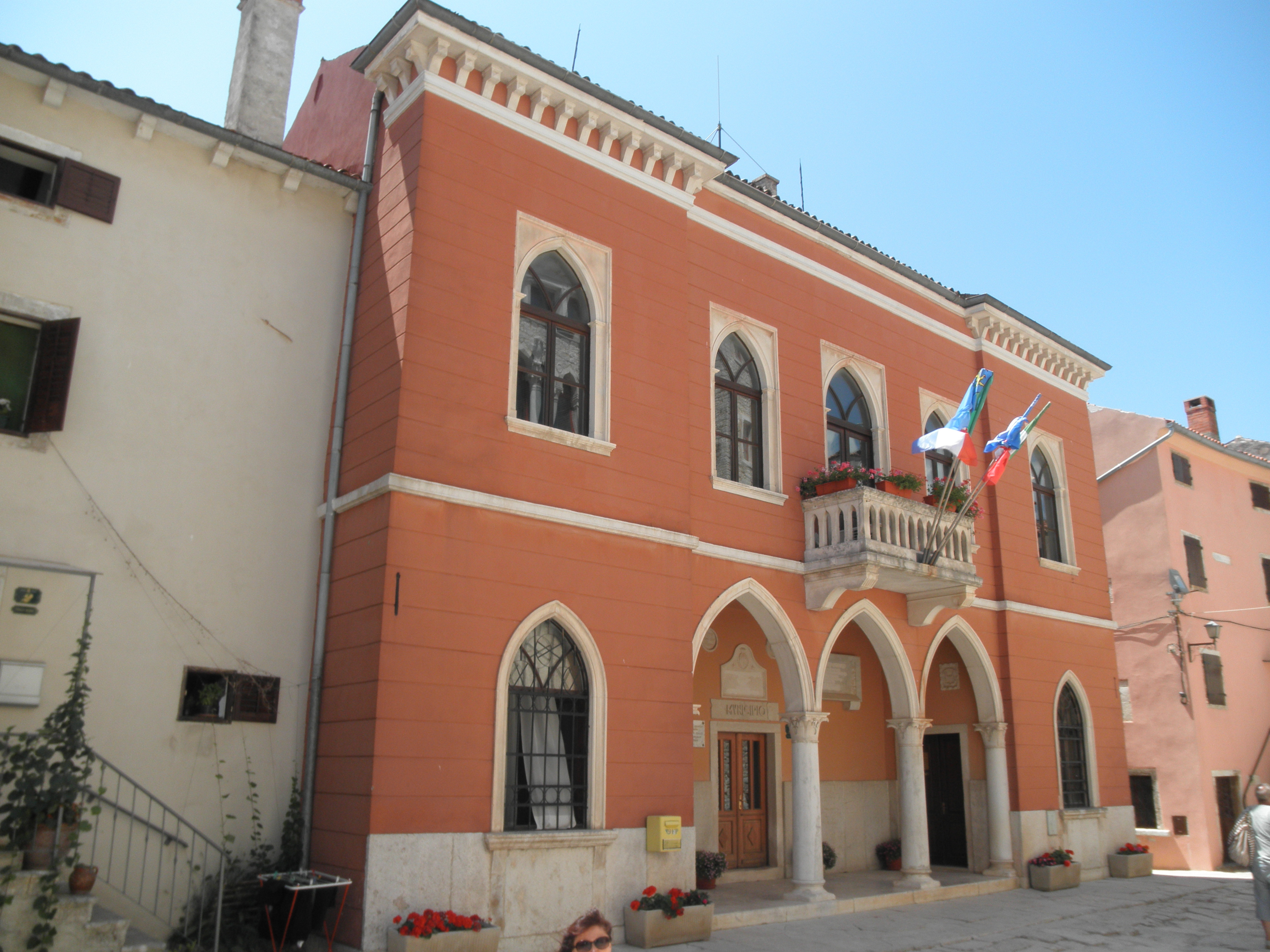 La venecia urbodomo de Bale - Valle